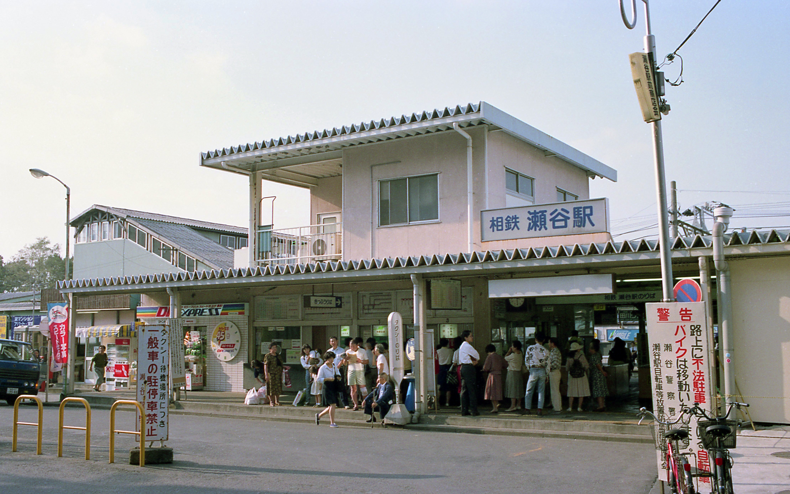 相鉄瀬谷駅南口（1990年9月22日撮影）